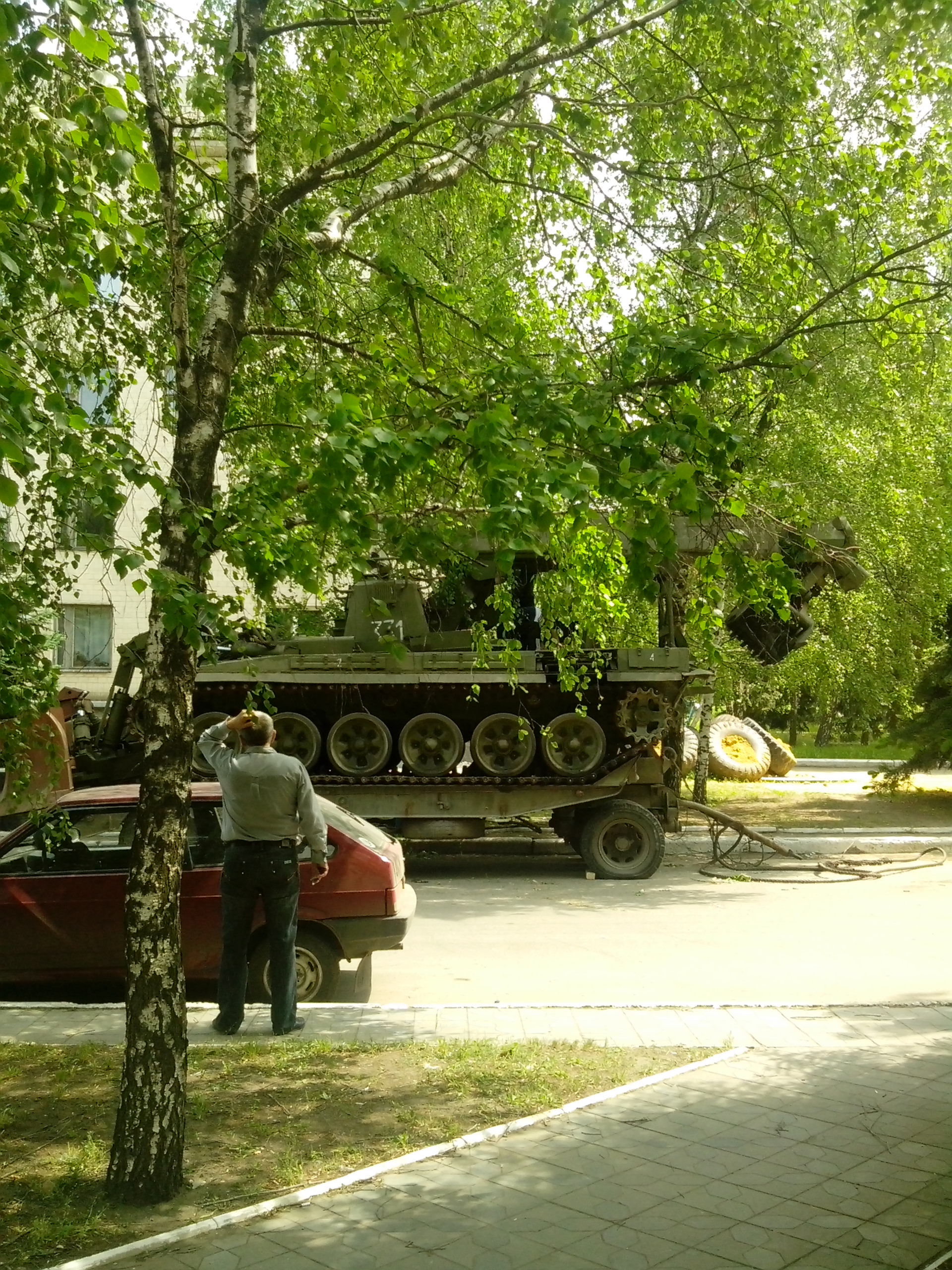 ІМР-2 біля міськради Краматорська, захоплений бойовиками угруповання ДНР